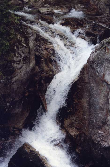 Foto gemaakt augustus 1993 (gedigitaliseerd 28 november 2006).